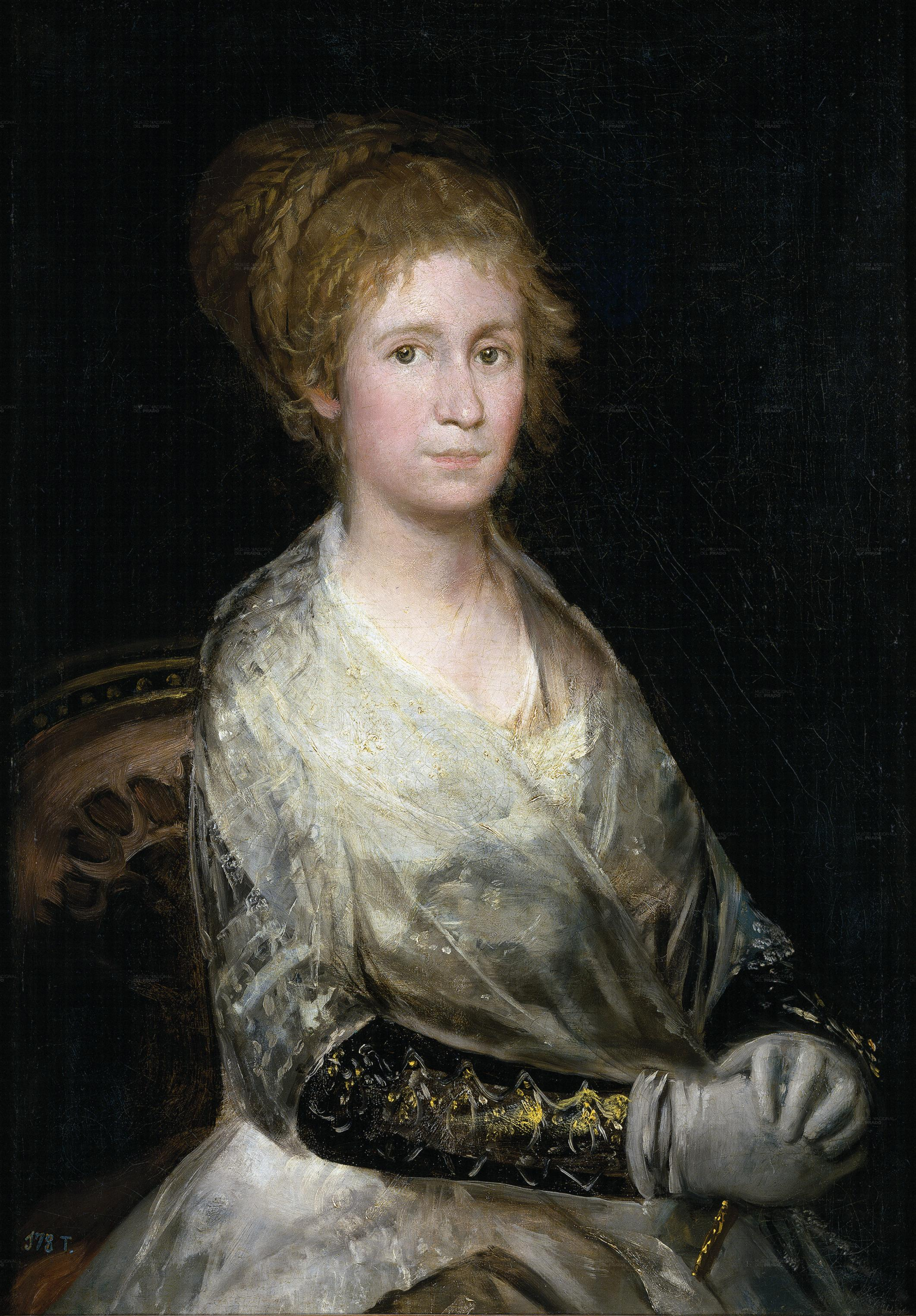 (según ficha en [1] Retrato de Leocadia Zorrilla). Durante más de un siglo, la mujer del retrato fue considerada Josefa Bayeu, la esposa de Goya (así figura en el inventario de Nuevas Adquisiciones de 1872, cuando el cuadro entró en el Museo del Prado procedente de Toledo, del Museo de la Trinidad). En buena lógica, sin embargo, y considerando que Josefa nació en 1747 y murió en 1812, es muy probable que fuera la dama aquí retratada, cronológicamente situada la obra hacia 1815, en virtud de su vestimenta y peinado. Posteriores estudios han apoyado la tesis de que sea Leocadia y no Josefa; en especial un conjunto de retratos de su madre hechos por Rosario Weiss en Burdeos, entre 1824-1828. (Ver en bibliografía: Ficha del cuadro en el Museo del Prado: Mena Marqués, 2002, il. XLV).